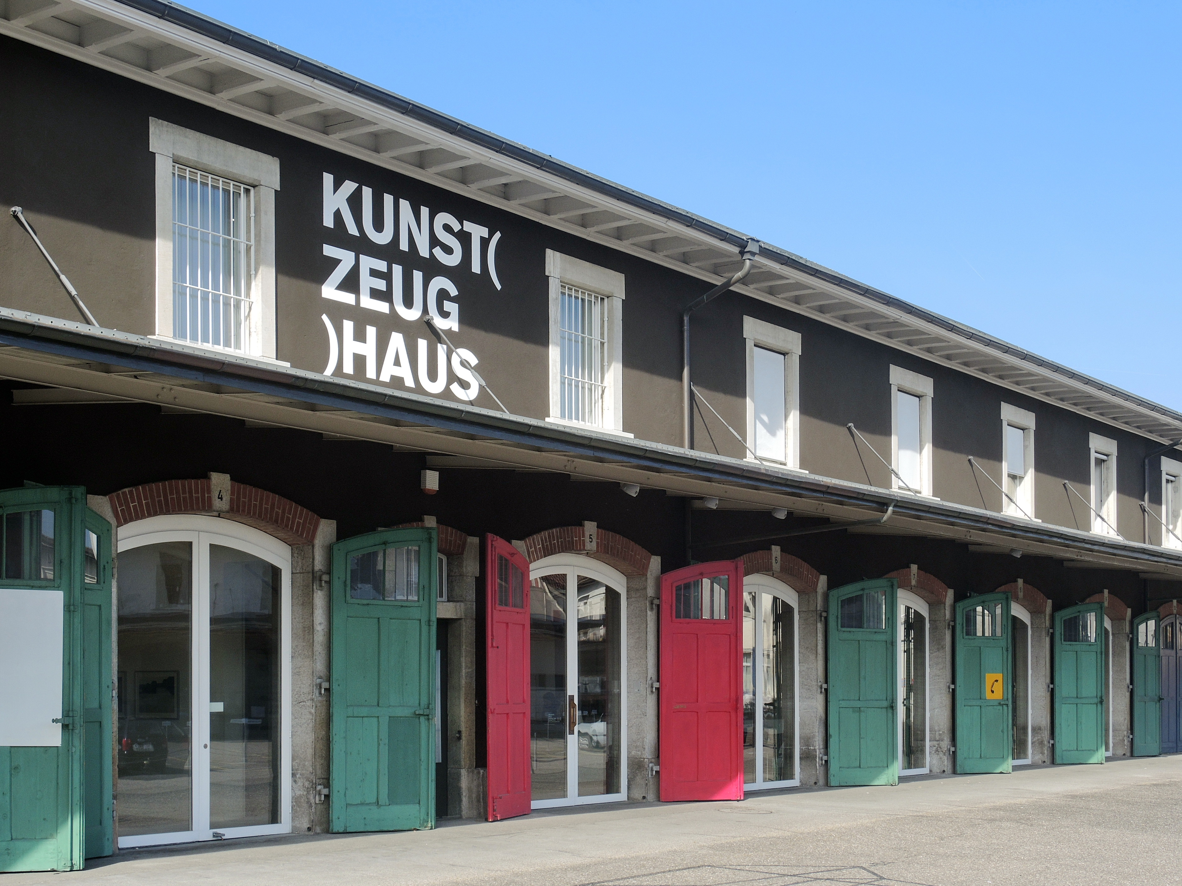 Kunst(zeug)haus in Rapperswil (Switzerland)